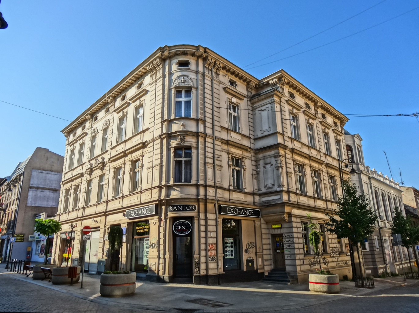 Kamienica przy ul. Dworcowej 39 w Bydgoszczy, róg ul. Marcinkowskiego